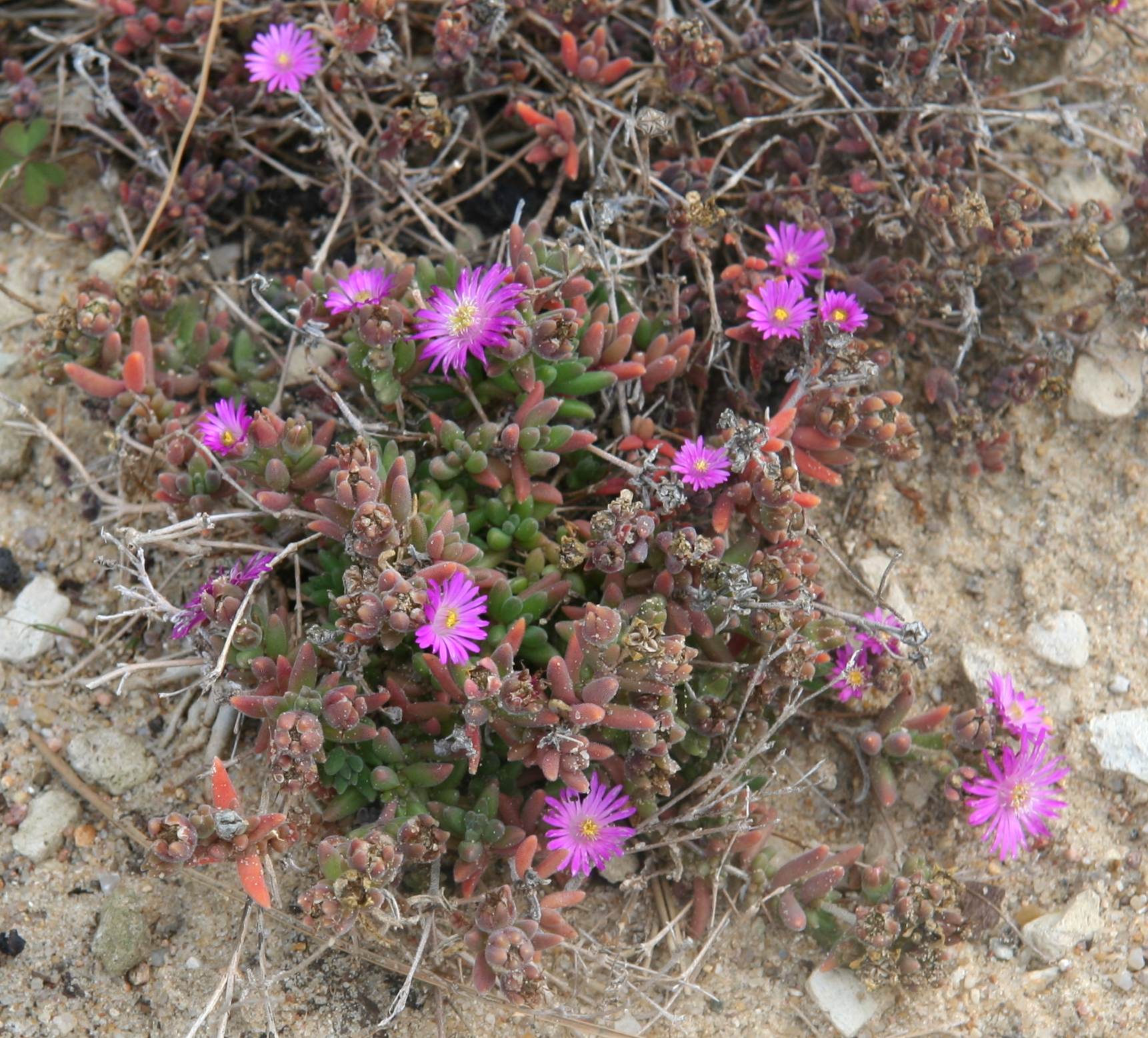 Delosperma aberdeenense im Botanischen Garten Hamburg